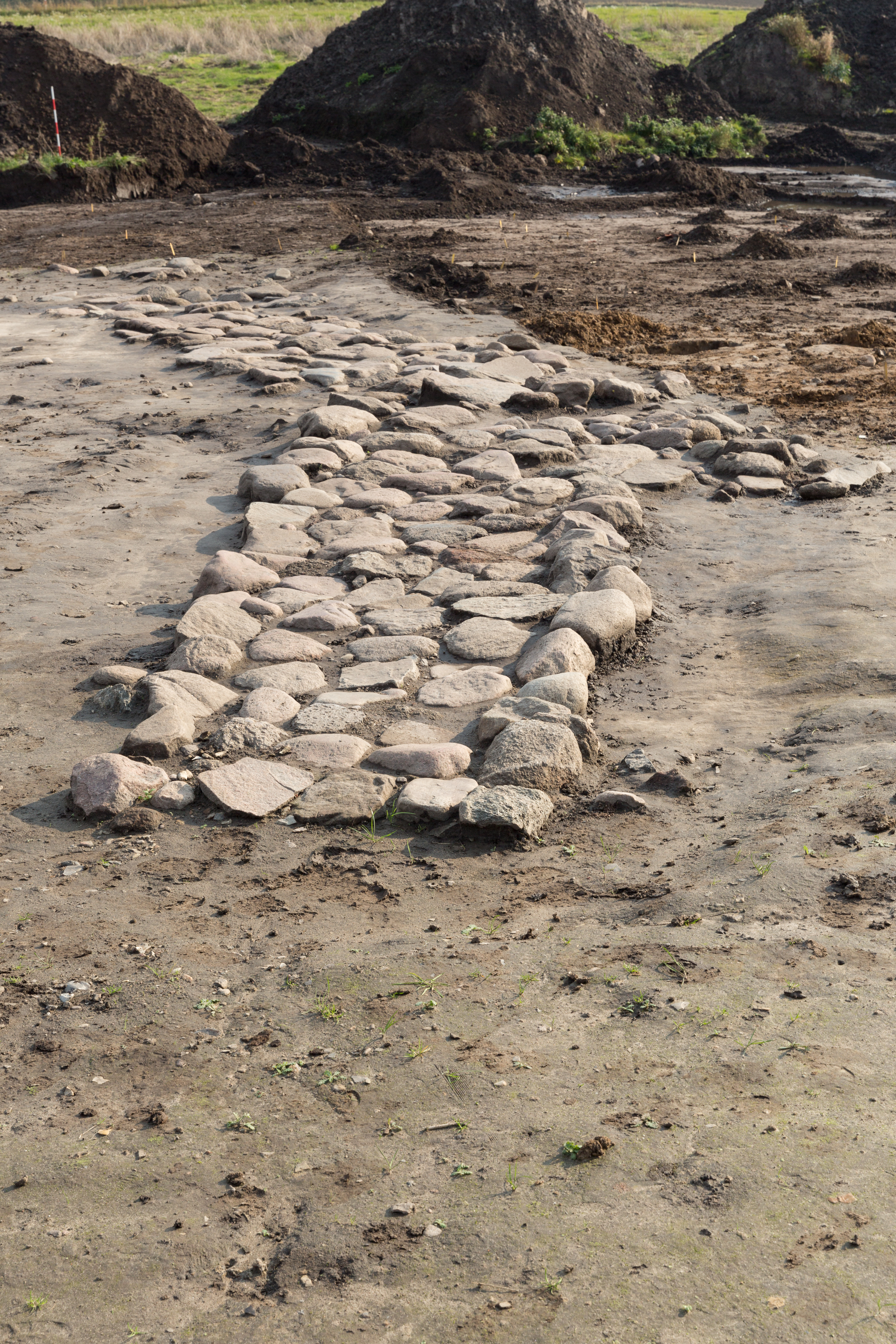 Brolagt jernaldervej